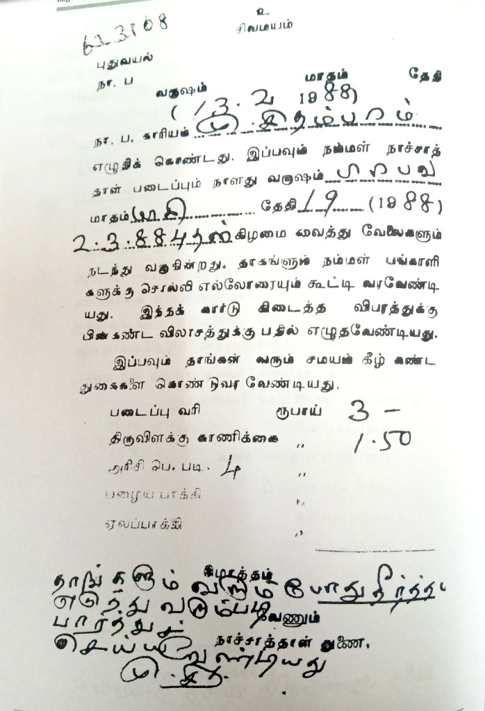 கி.பி.1823-லிருந்து உறுதிக்கோட்டை வட்டகை நகரத்தார்கள் பிரிந்து வாழ்ந்தாலும் மேற்படி நாச்சாத்தாள் படைப்பில் தொடர்ந்து கலந்து கொண்டு வருகிறார்கள். இதற்கு ஆதாரமாக புதுவயலில் இருந்து உறுதிக்கோட்டை வட்டகை நகரத்தாரை சேர்ந்த வயிரவன் கோவில் புள்ளிகளுக்கு ஆண்டுதோறும் வந்துகொண்டு இருக்கிற அழைப்புகளில் உறுதிக்கோட்டை வட்டகை நகரத்தாரை “நமது பங்காளிகள்” என்று குறிப்பிடப்பட்டிருக்கிறது.